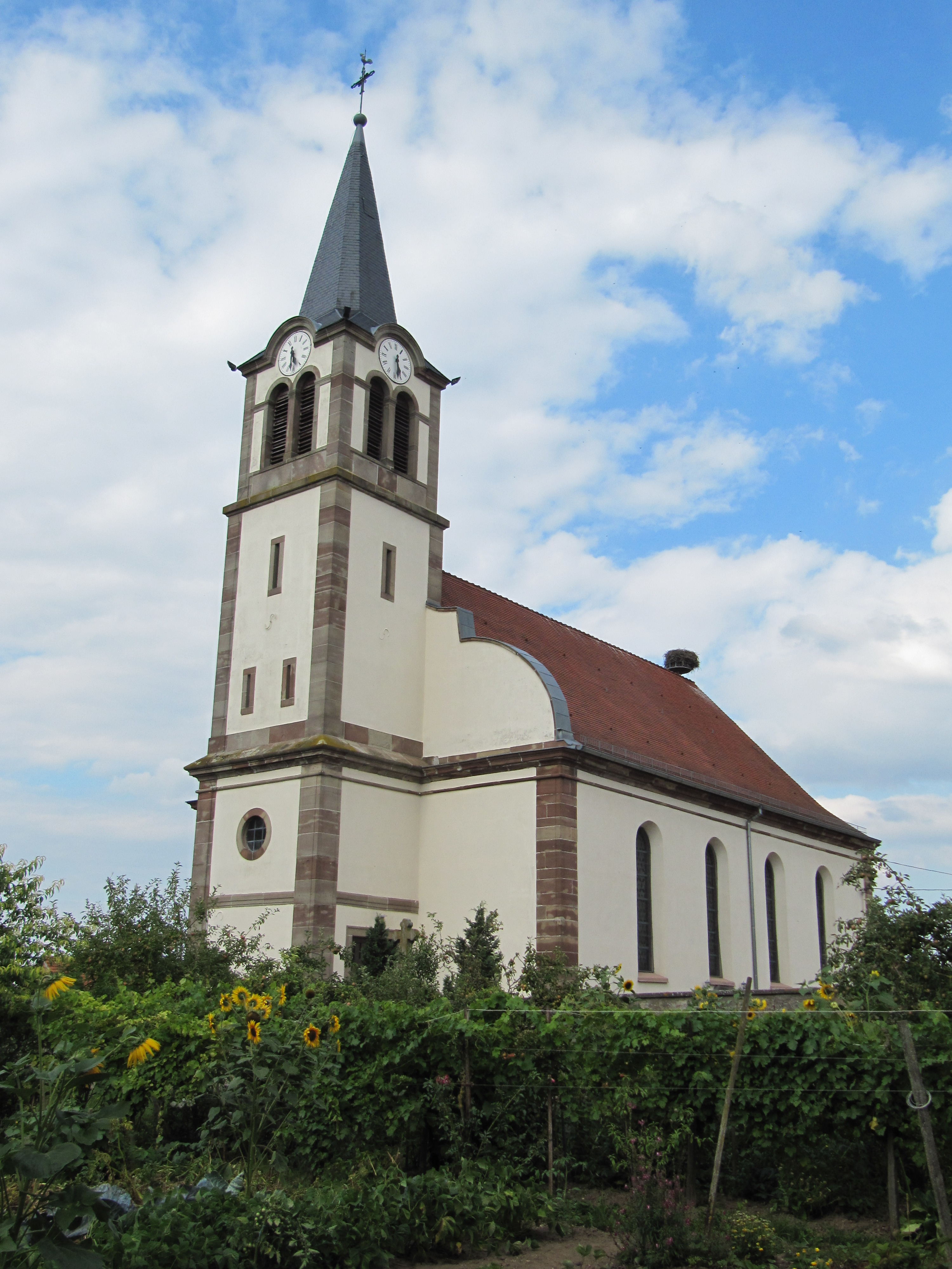 Lupstein, église Saint-Quentin